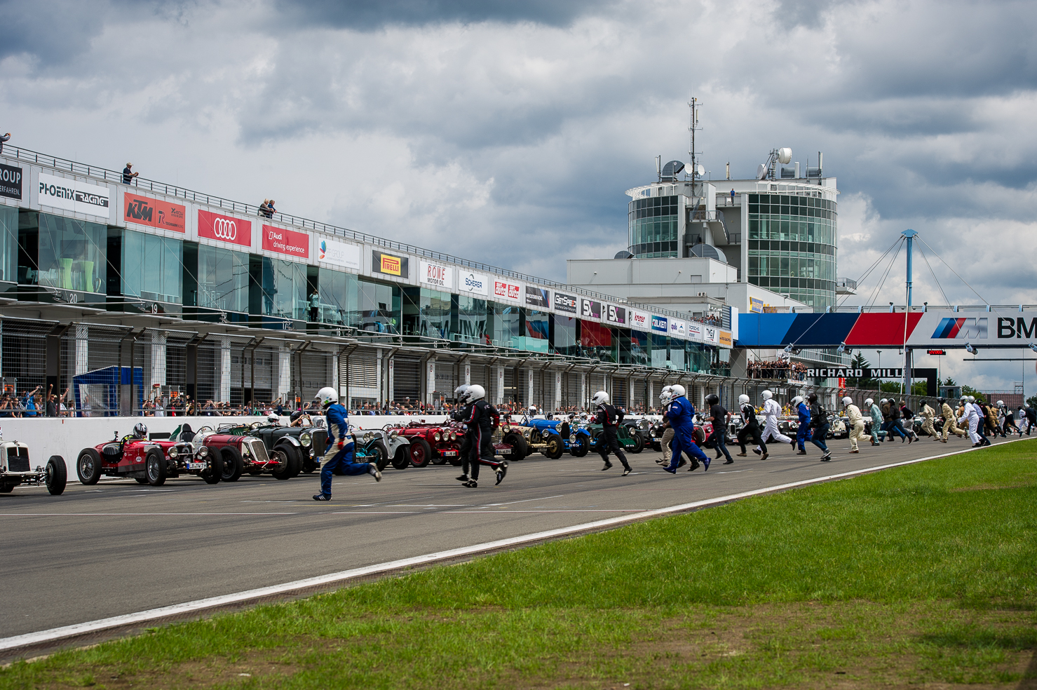 Le Mans-Start beim Elefantenrennen im Rahmen der Nürburgring Classic.